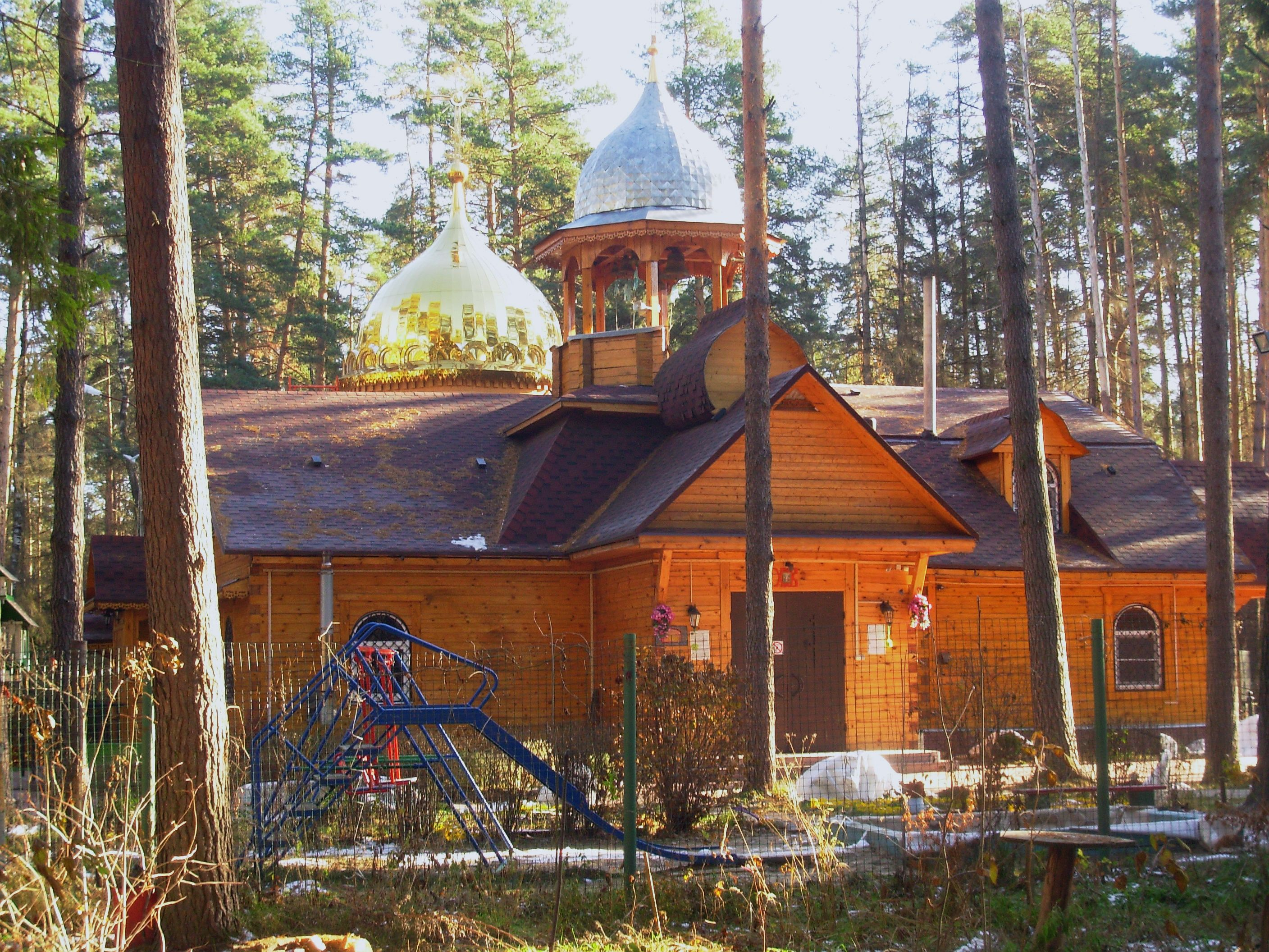 Храм в Монтно